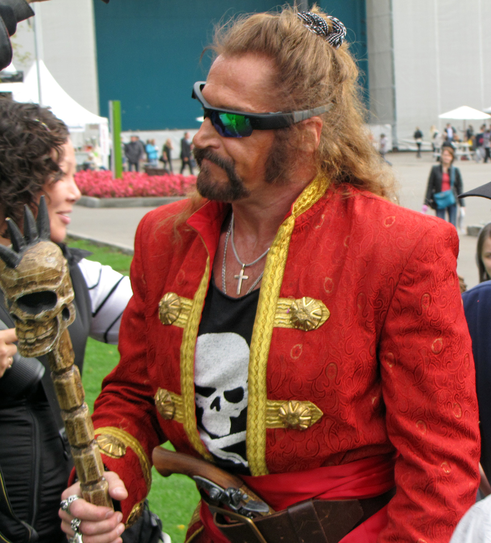 Никита Джигурда решил в очередной раз "себя показать", на этот раз в Парке Горького